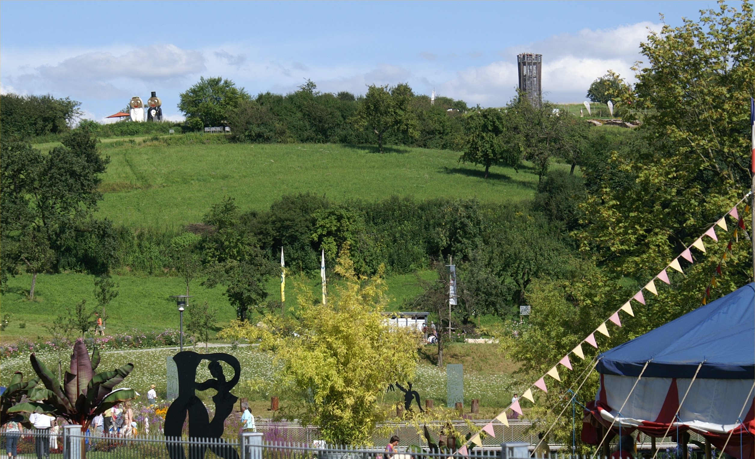 Die Gartenschau in Rechberghausen unter dem Motto "Rechberghausen blüht auf, Sommer-Blüten-Träume, findet vom 29. Mai bis zum 20. September 2009 statt.